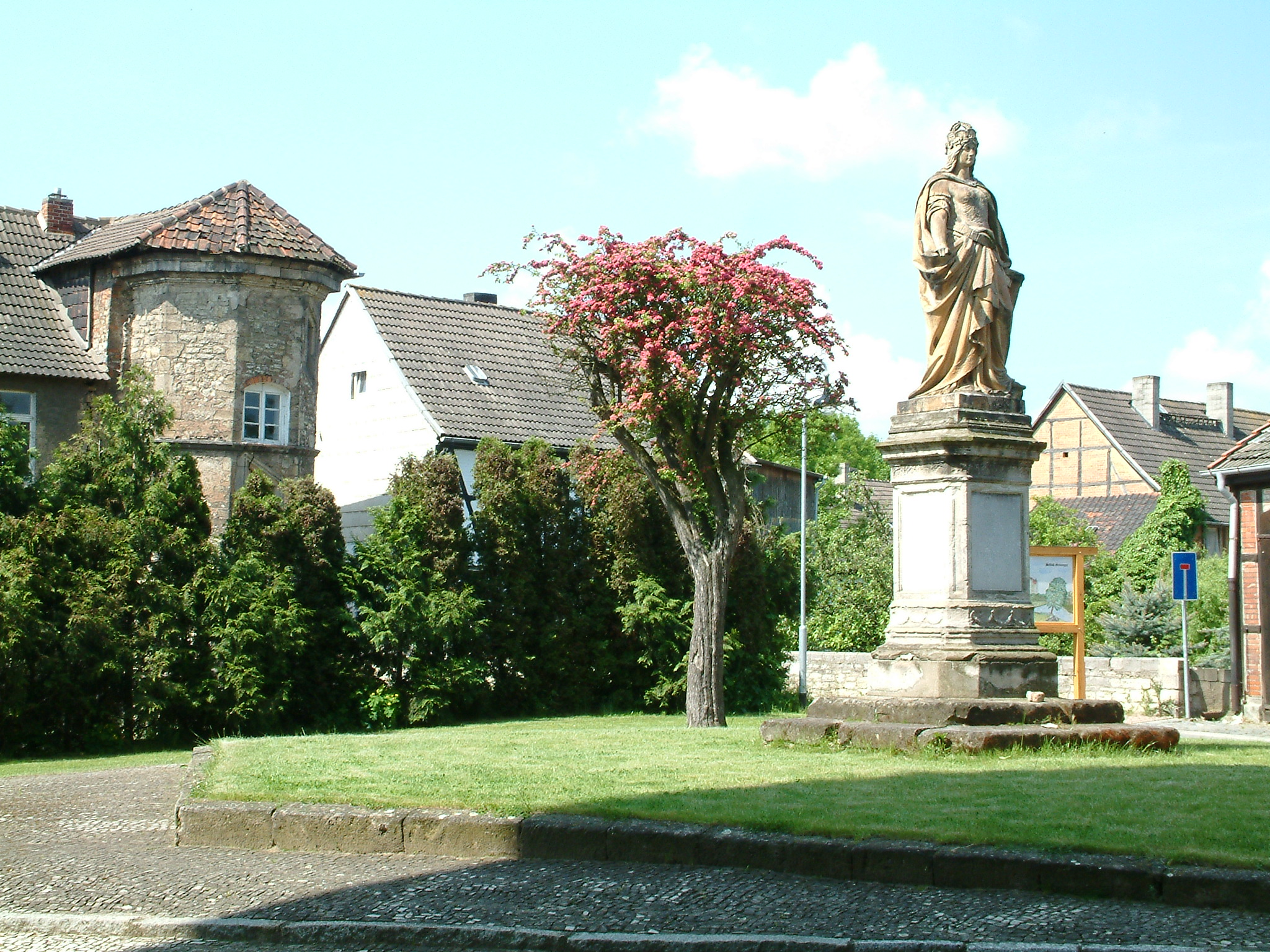 Germania-Denkmal mit dem 1473 erbauten Brückentorhaus des ehemaligen Residenz,- u. Renaissanceschlosses Gröningen